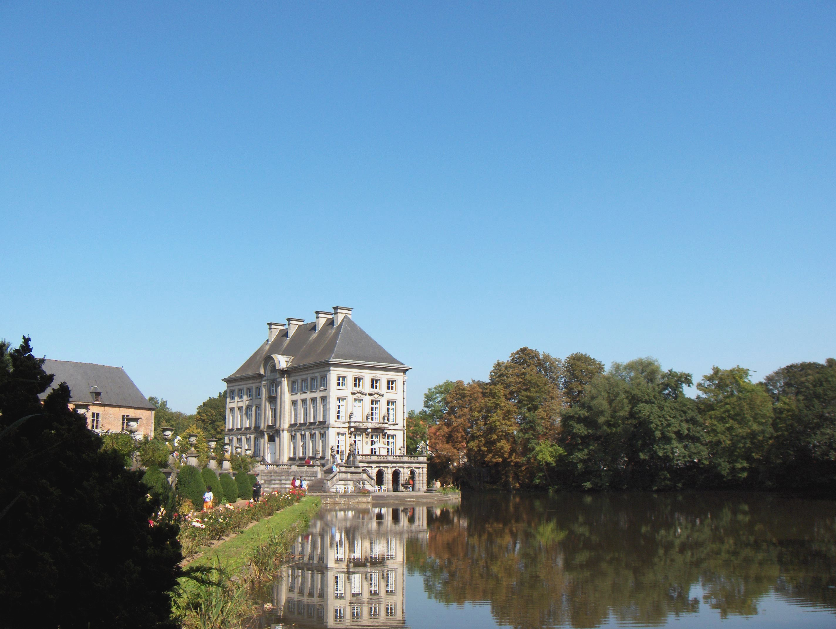 Feluy, Ortsteil der Gemeinde Seneffe, Prov. Hennegau (Belgien), Schloss und Garten (ca. 1940).